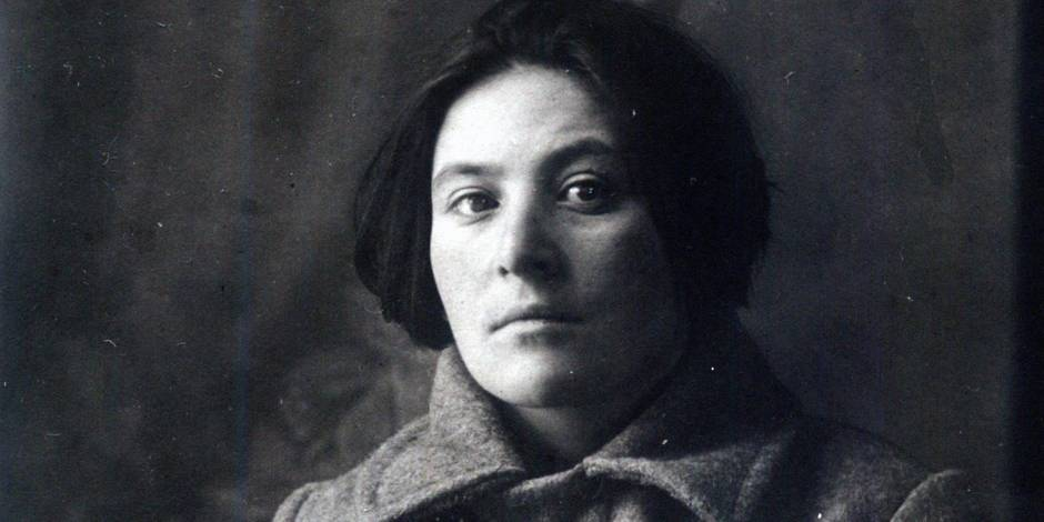 Eugénie Iaroslavskaïa-Markon, de son nom de jeune fille Eugénie Markon, prononcé en russe Iévguénia Markonne, est une anarchiste autobiographe, née le 14 mai 1902 à Moscou et fusillée au bagne de Solovki (ru) le 20 juin 1931